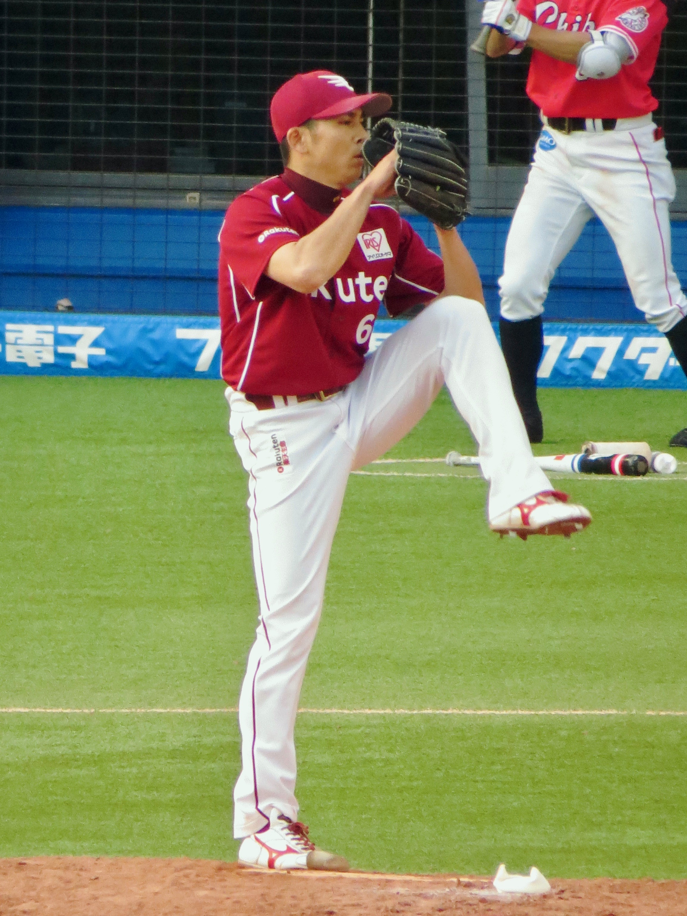 ZOZOマリンスタジアムにて